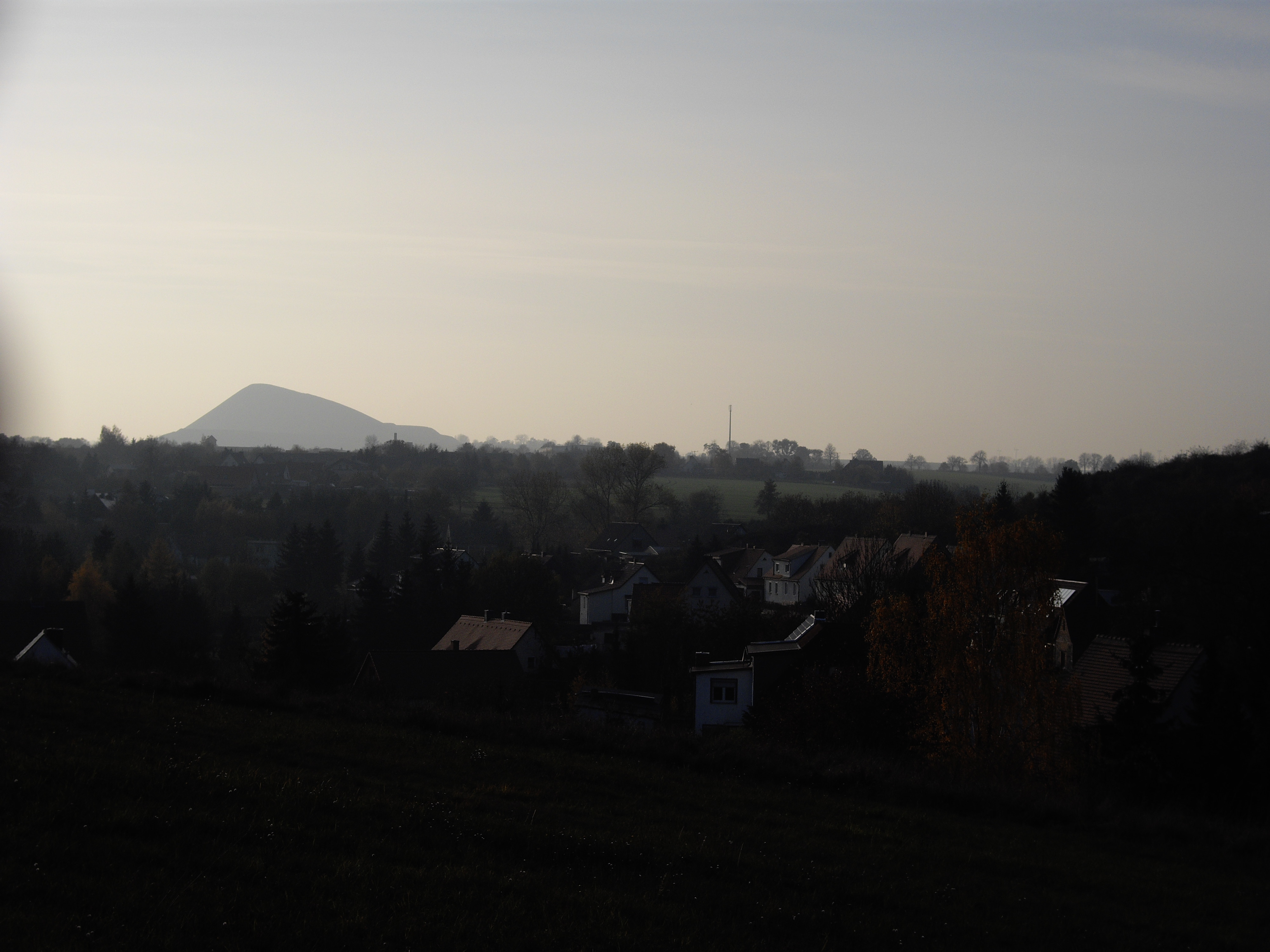 Blick über die Ortschaft Heiligenthal